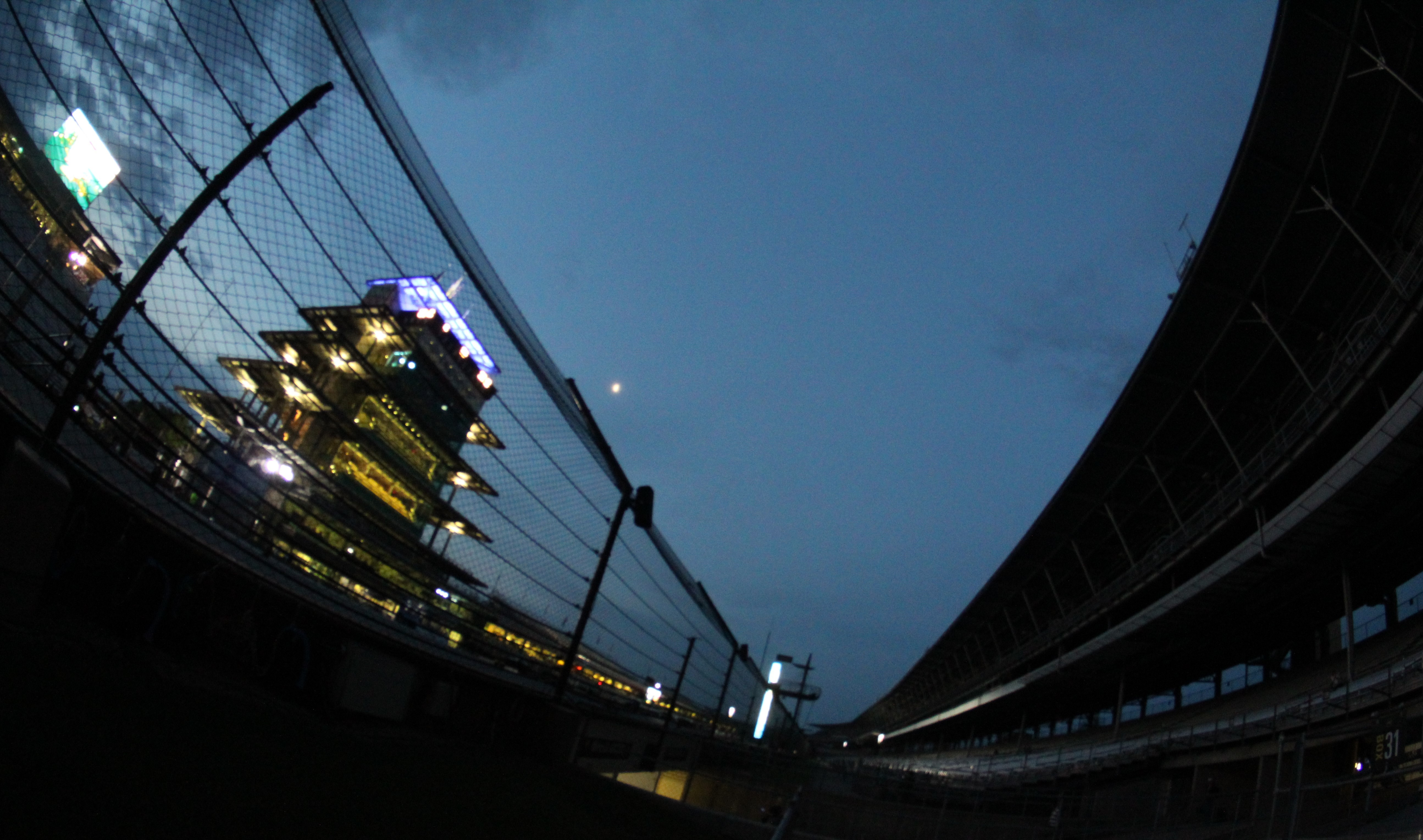 2019 Indianapolis 500